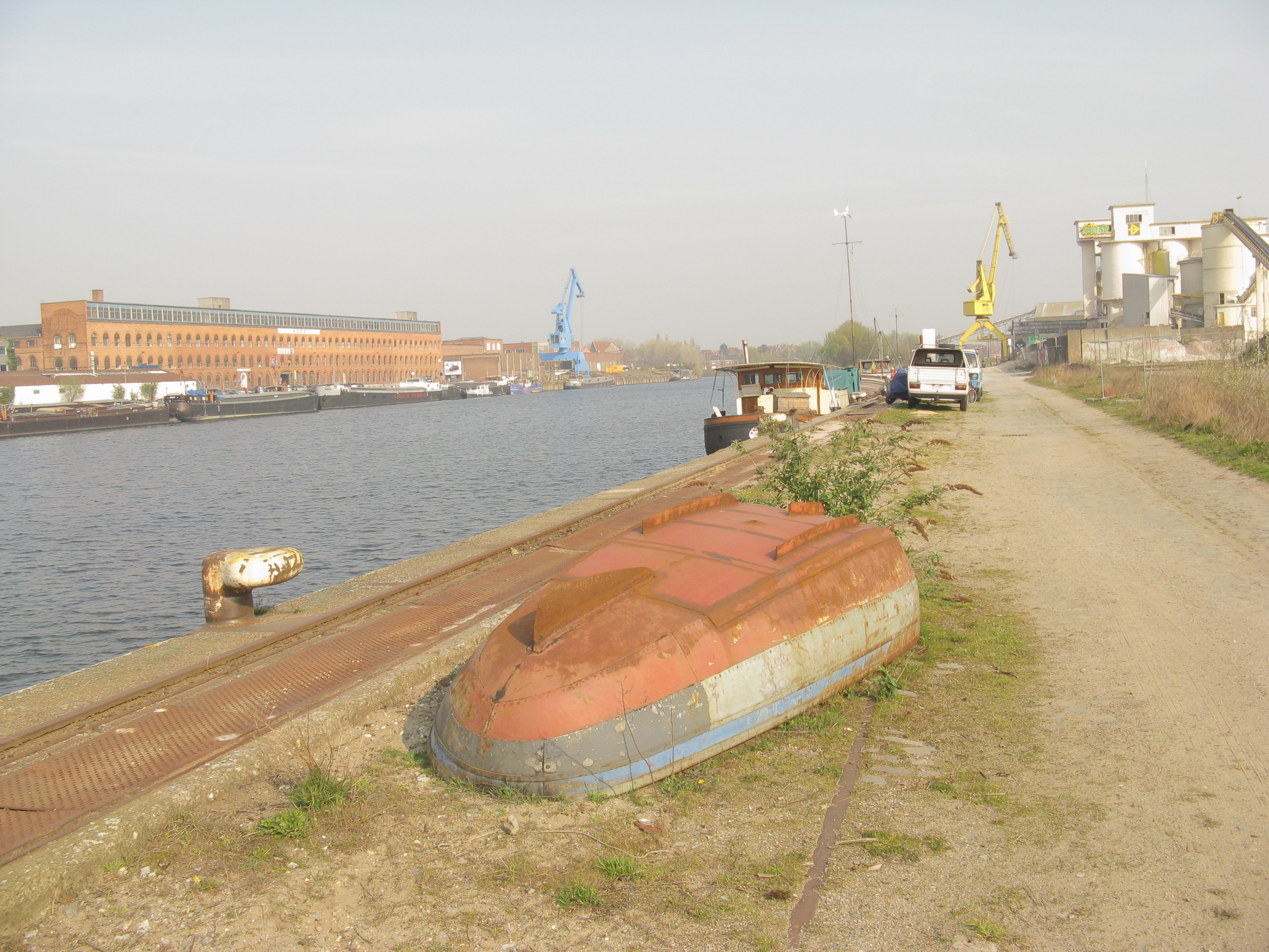 Het Handelsdok van de haven van Gent.